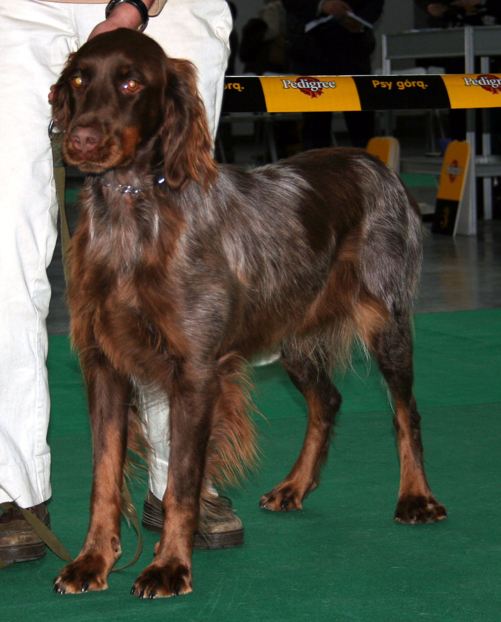 Epagneul_picard na Światowej Wystawie Psów Rasowych w Poznaniu